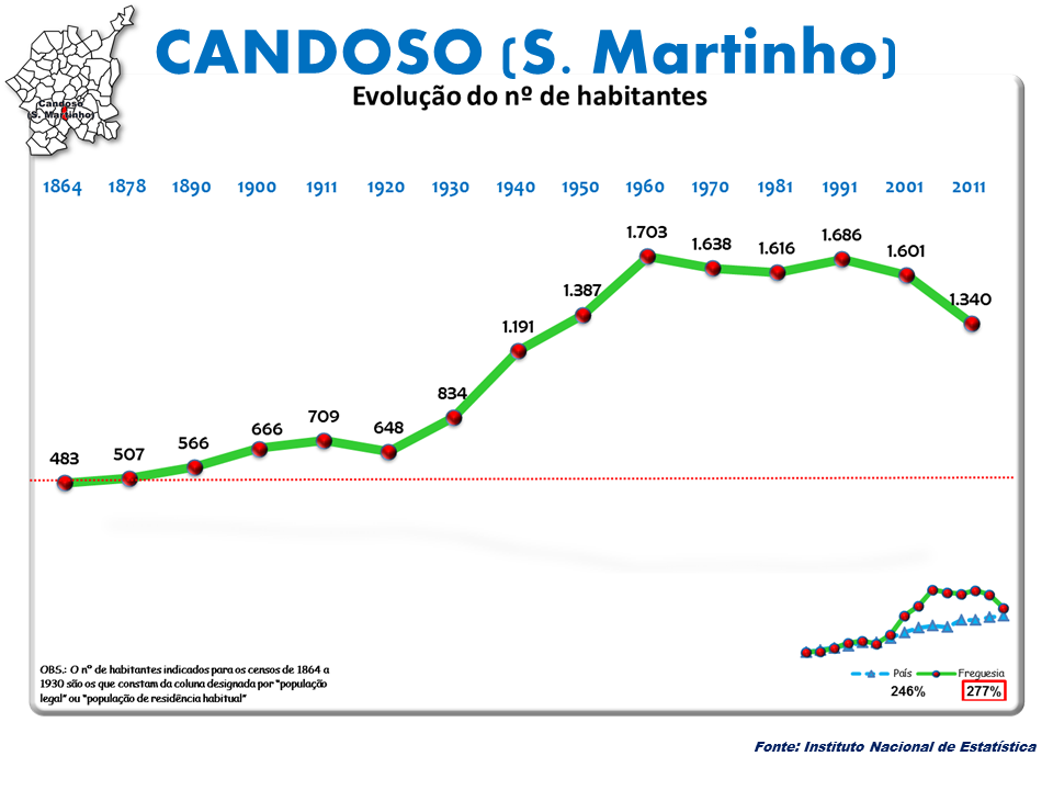 Evolução da População 1864 / 2011